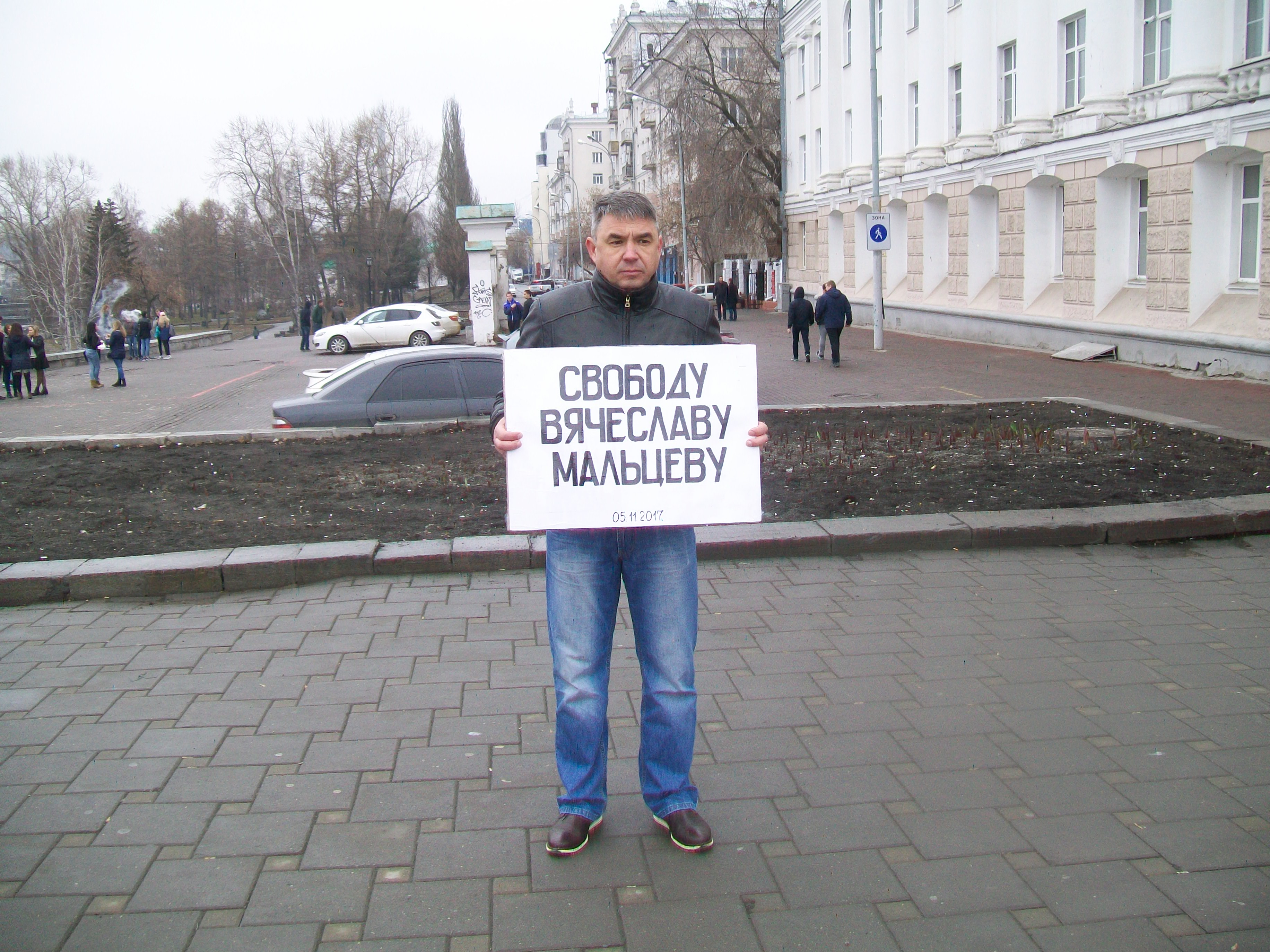 Одиночный пикет в защиту Вячеслава Мальцева в Екатеринбурге 15 апреля 2017 года. Дата на табличке - 05 ноября 2017 года - это день намечаемой Мальцевым революции в России